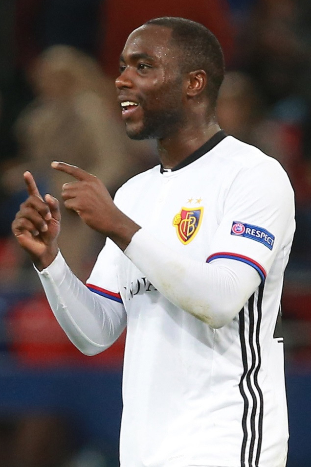 ЦСКА - «Базель»